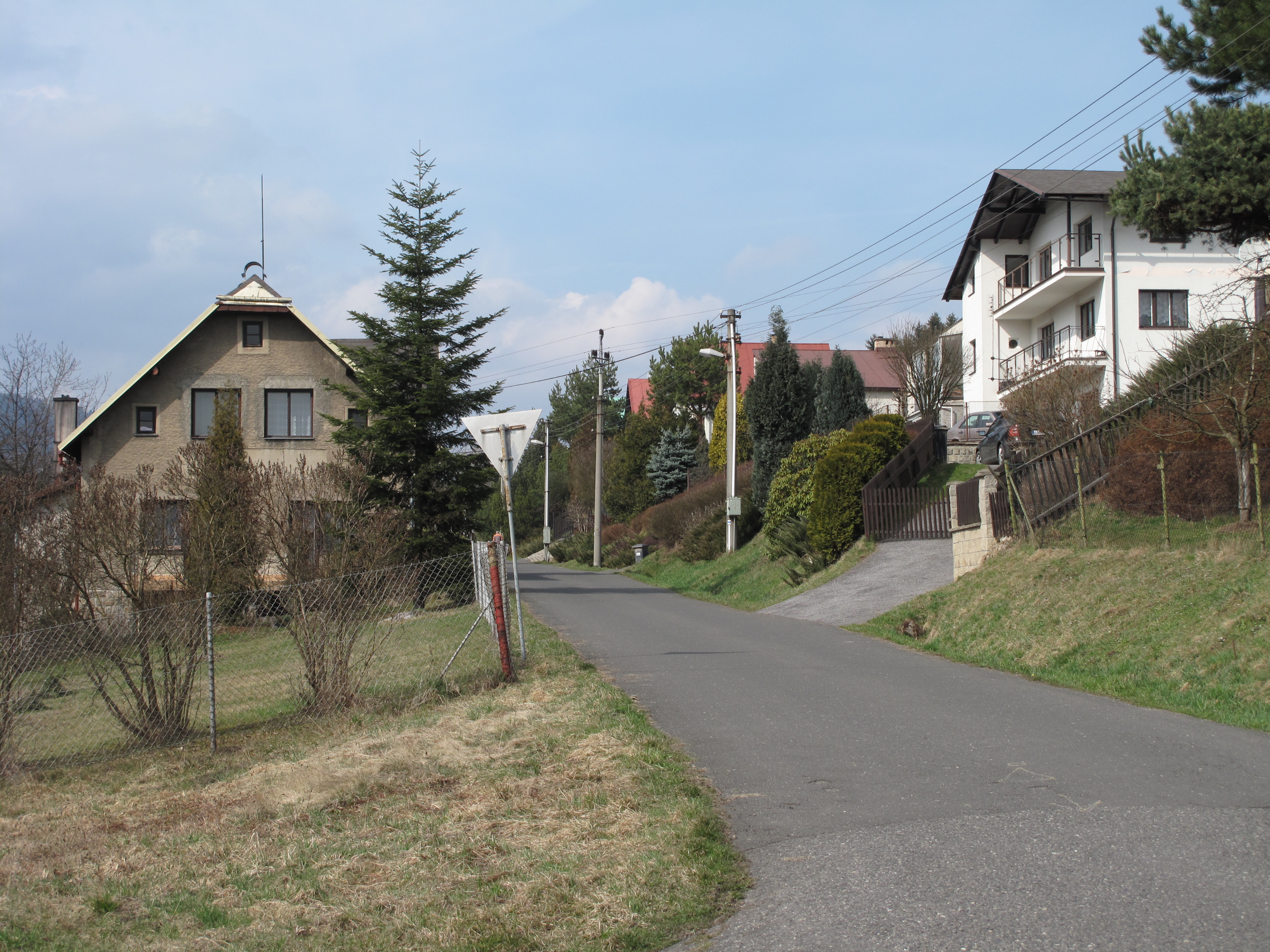 Domy v Haraticích. Okres Jablonec nad Nisou, Česká republika.